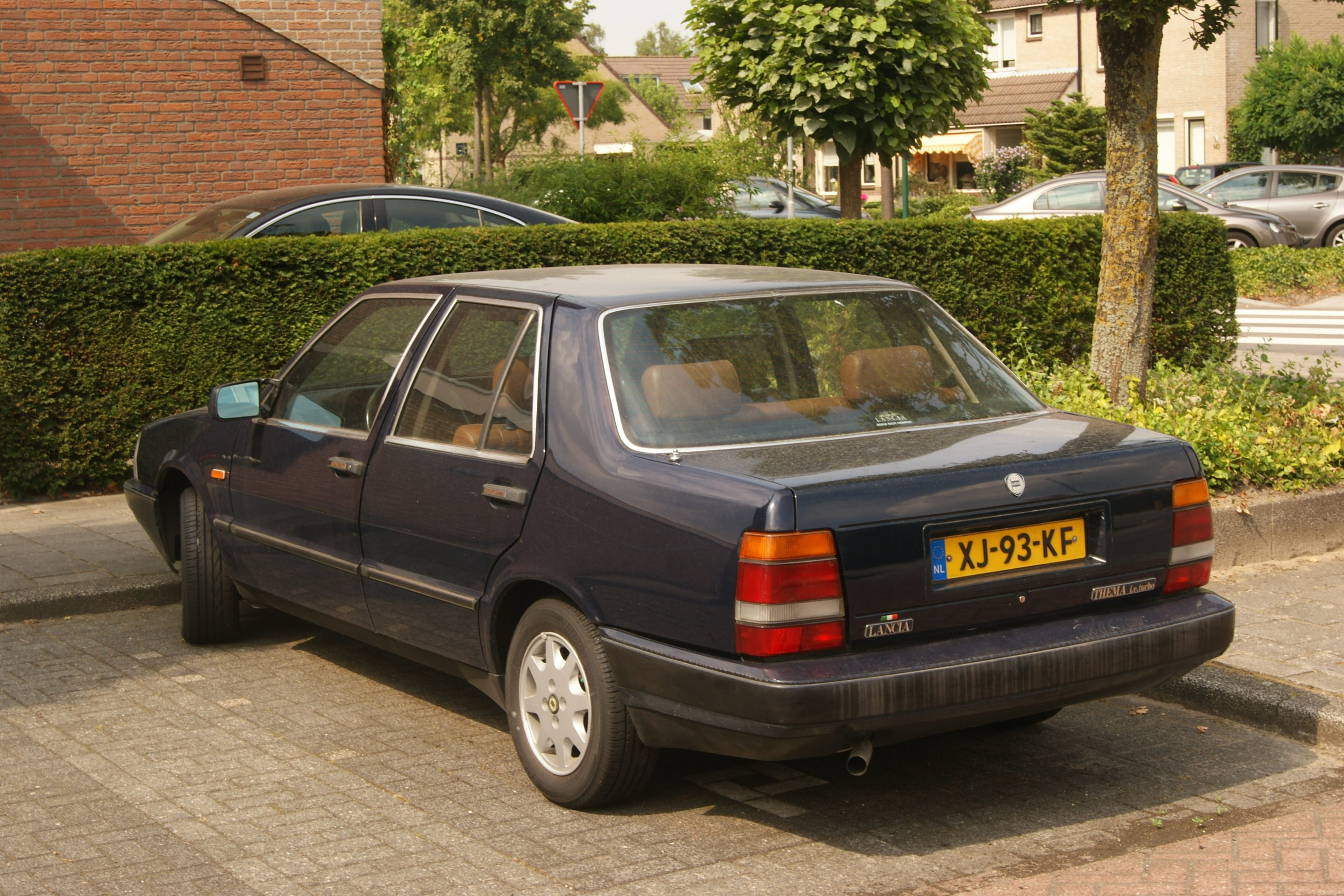 XJ-93-KF